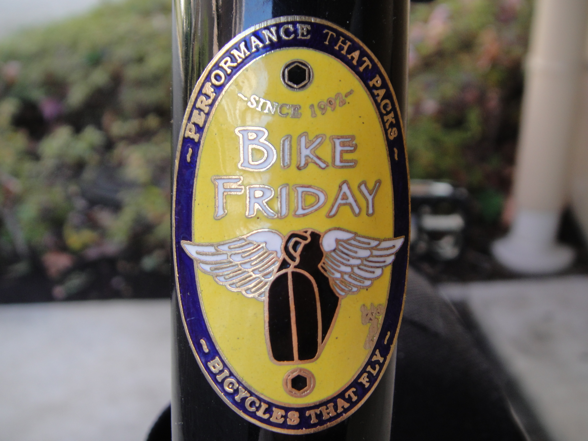 アメリカのグリーンギアサイクリング製造のバイクフライデーのヘッドバッジ